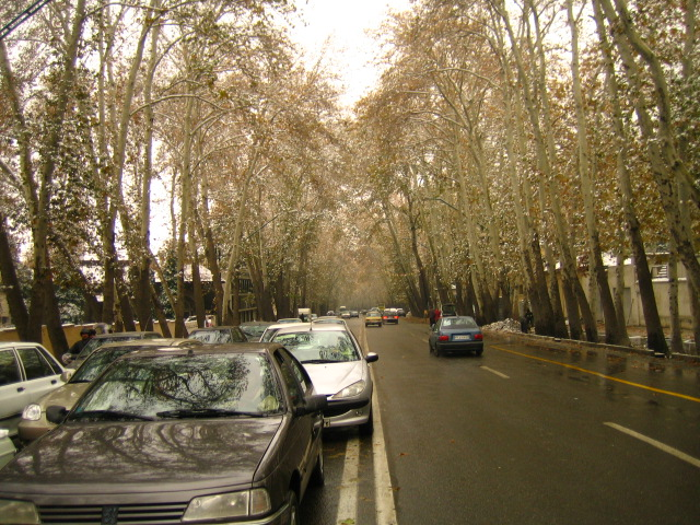 Valiasr Street, Tehran